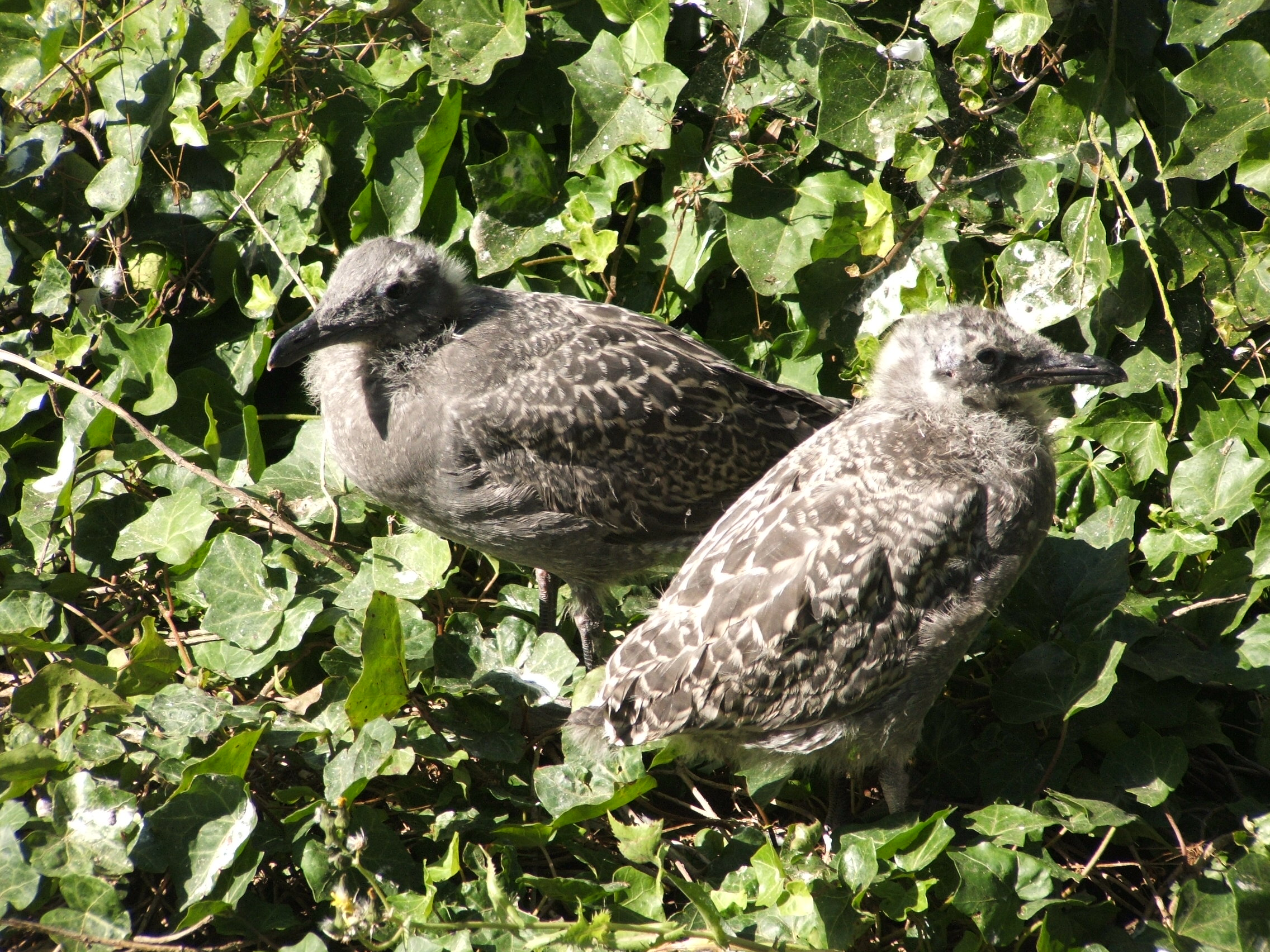 Alcatraz Island